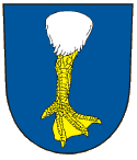 Znak obce Kokory